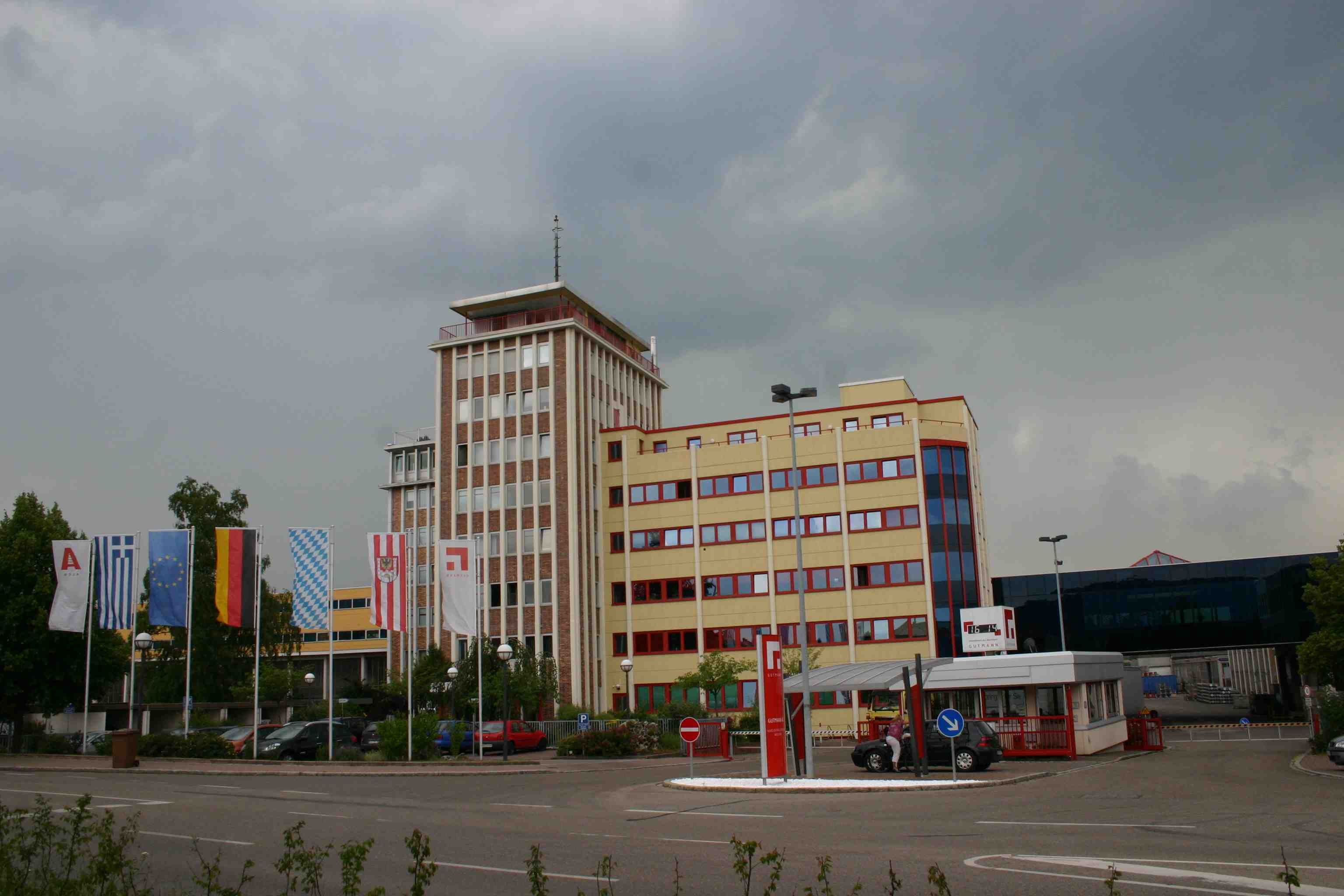 Guthmann Weißenburg